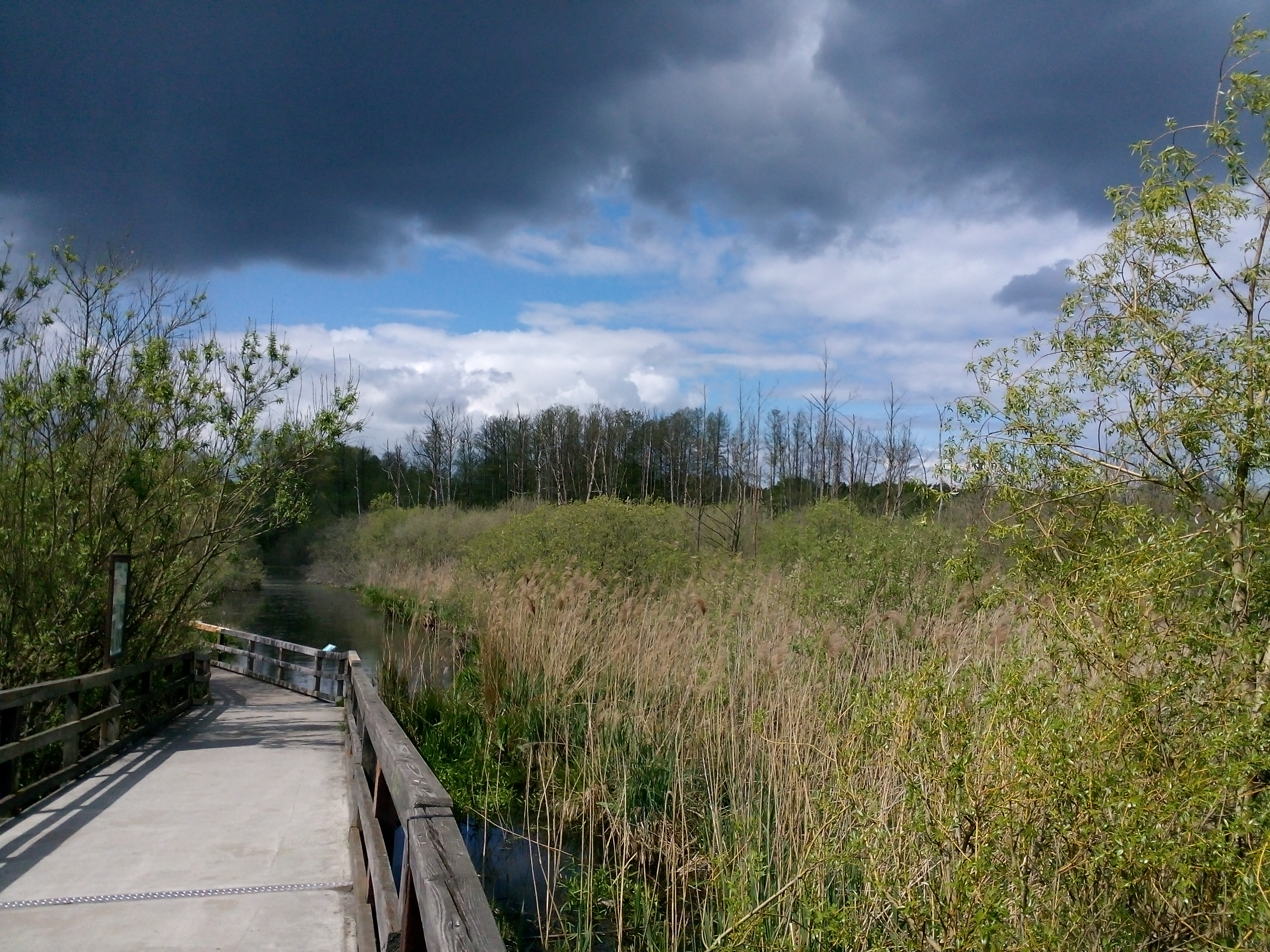 Kleiner Teil des Eichwerder Stegs zwischen Hermsdorf und Lübars im FFH-Gebiet „Tegeler Fließtal“ in Berlin (Deutschland)